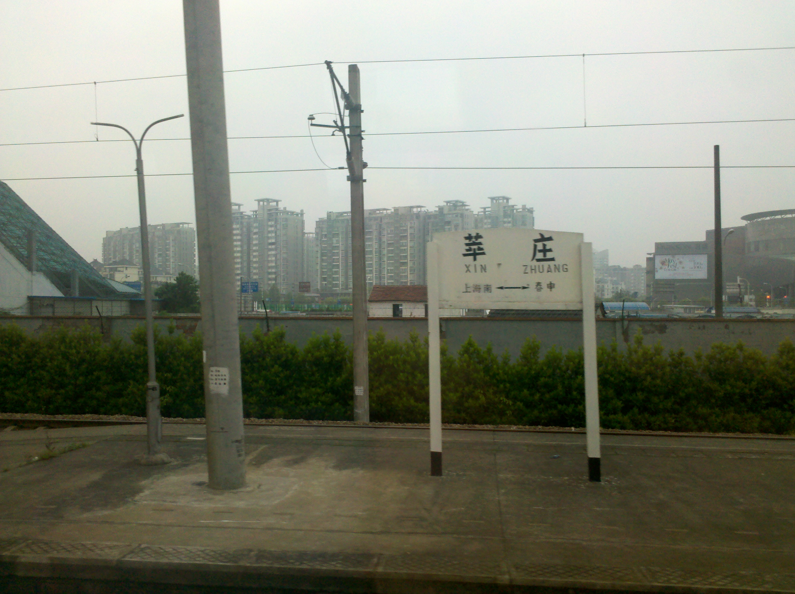 从驶向上海南的K288次列车内拍摄莘庄站